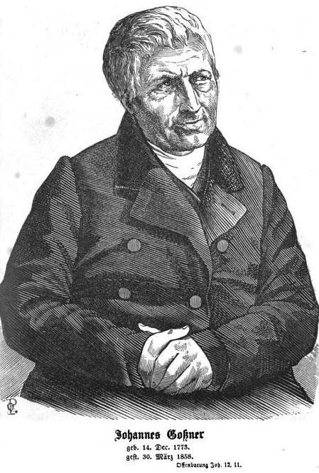 Bildnis Johann Evangelista Goßner (1773–1858)